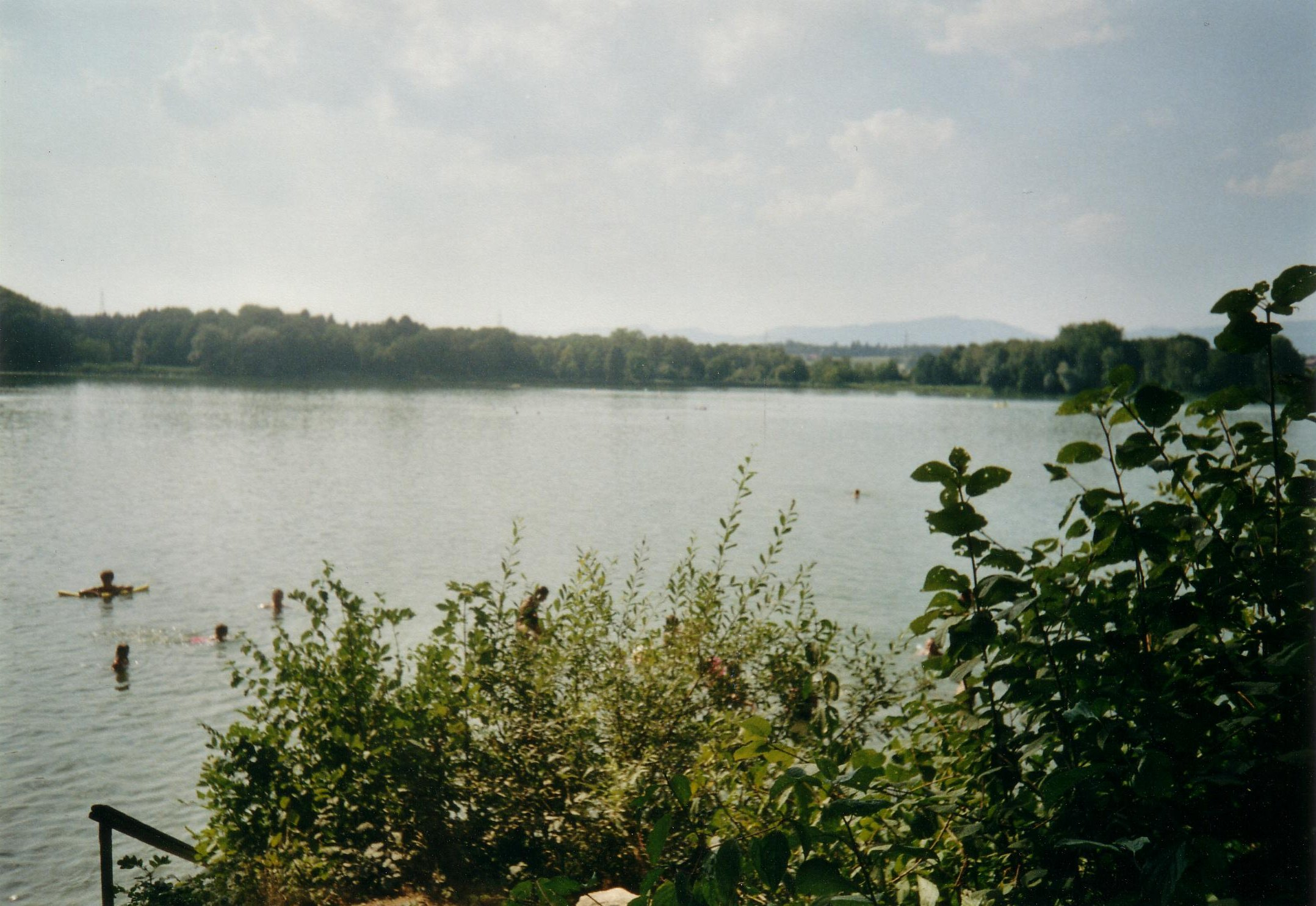 Burgäschisee vom südöstlichen Ufer aus.